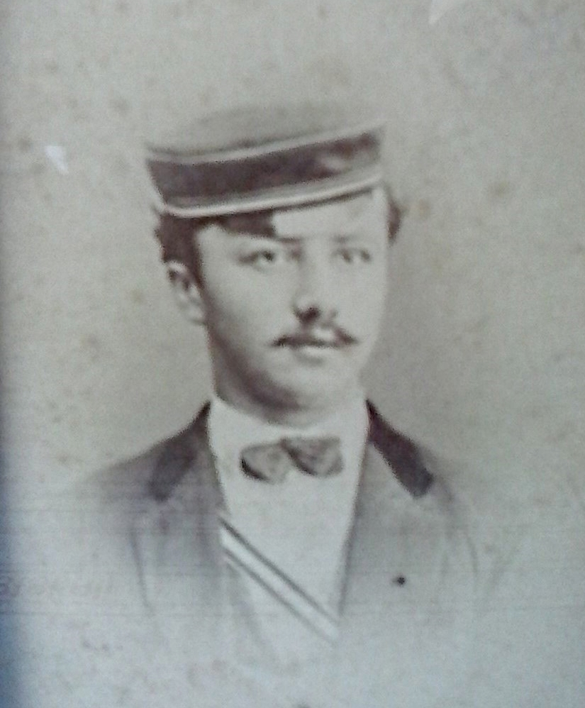 Otto Sprengel als Tübinger Corpsstudent